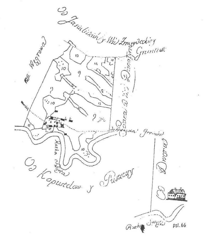 1794 m. Šventupės dvaro detalusis valdų planas